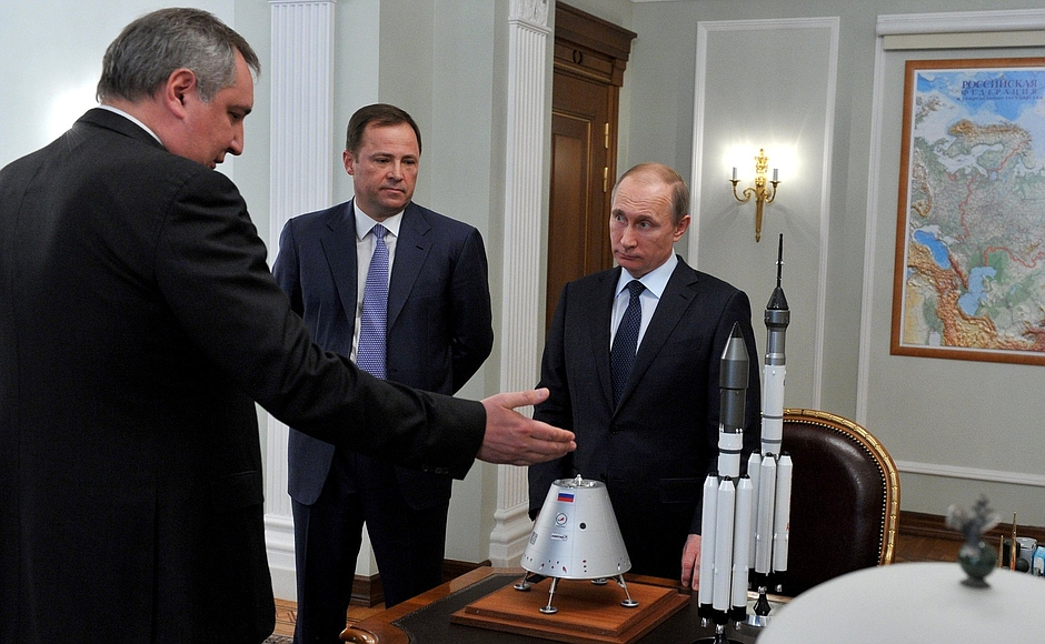 В.Путин, И.Комаров, Д.Рогозин, макет ППТС и Ангары-А5